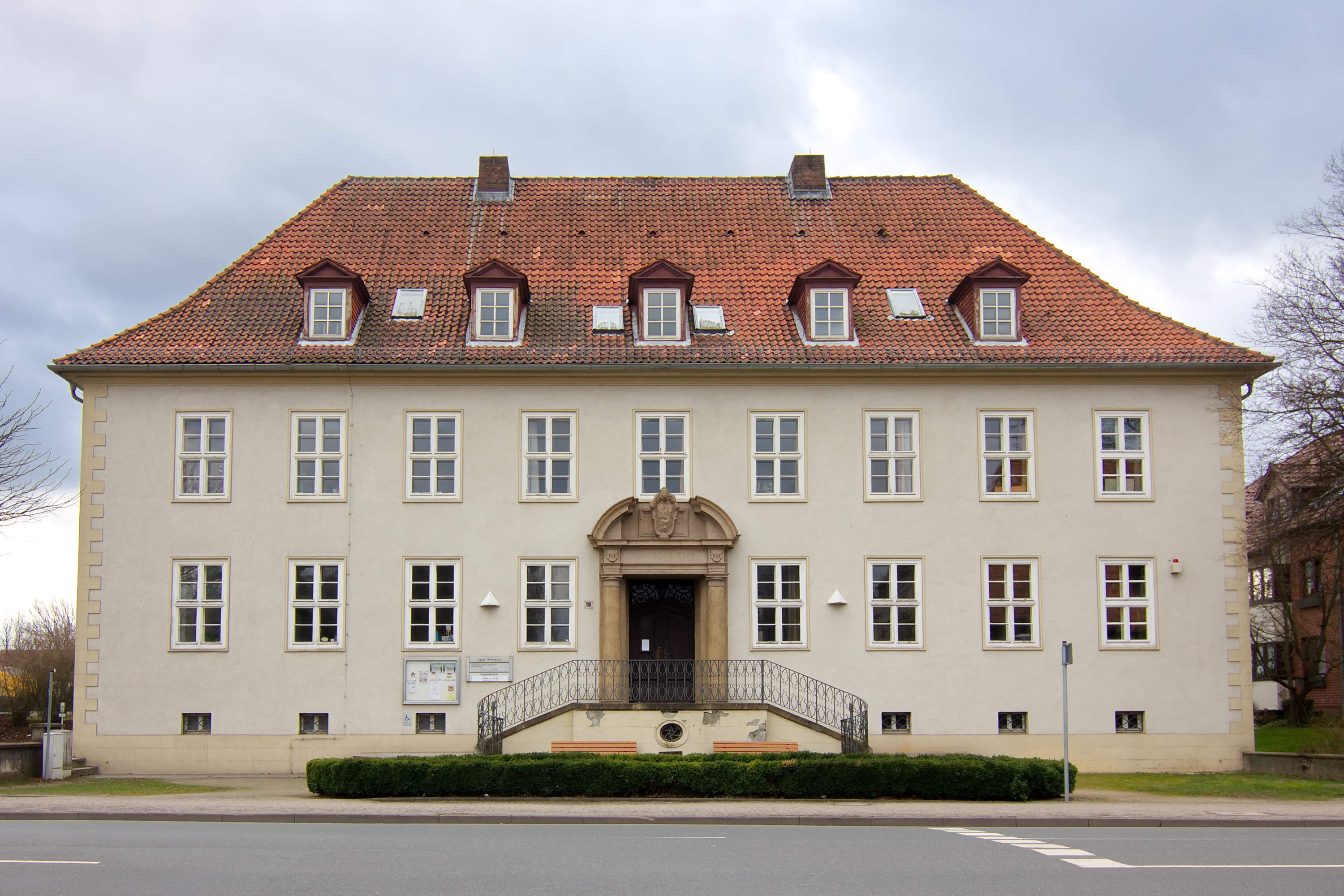 Fallersleben (Wolfsburg), Niedersachsen, Deutschland